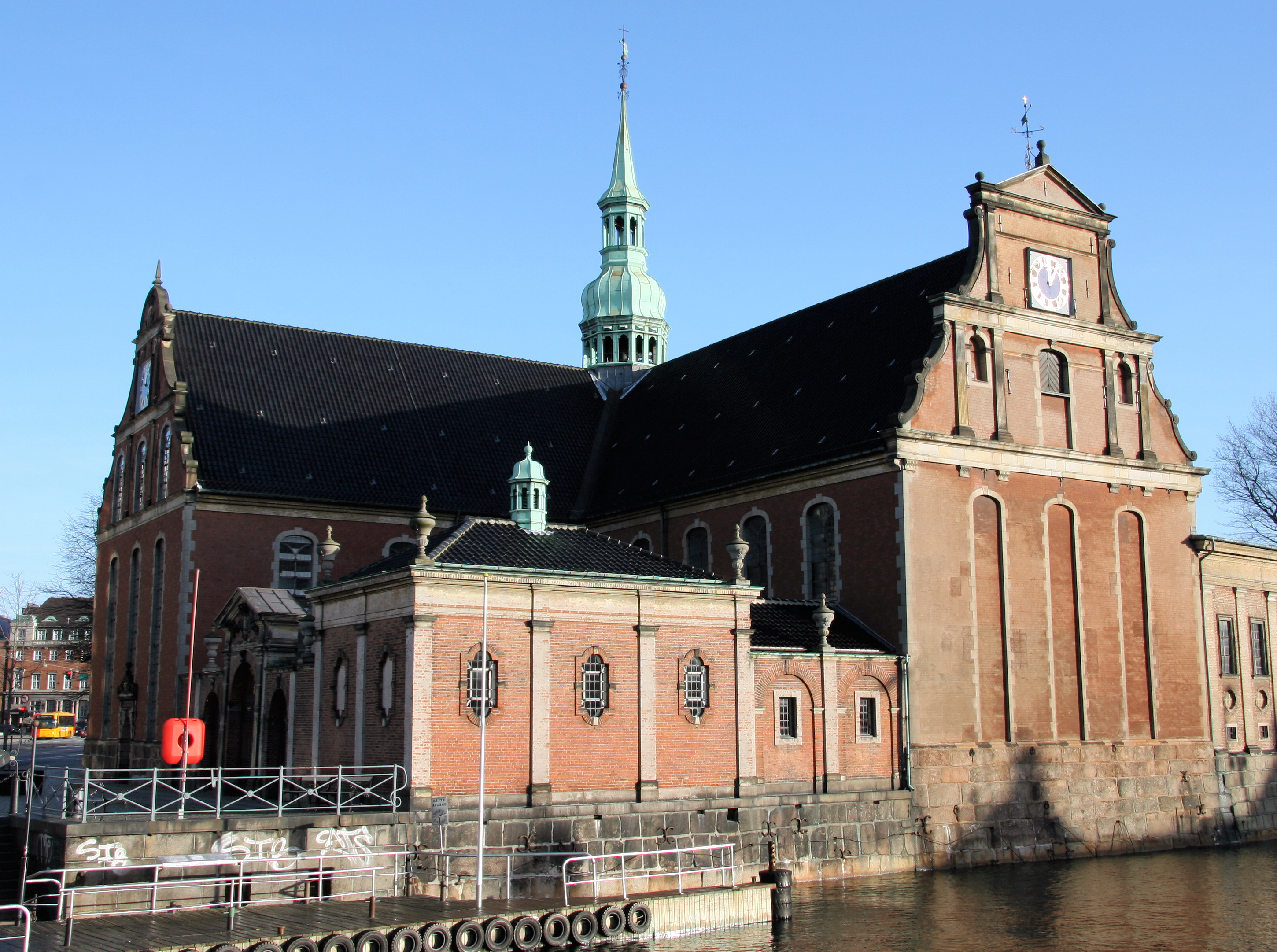 Holmens Kirke, Copenhagen, Denmark . Set fra vest